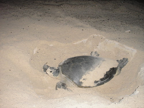 السلاحف البحرية بمحمية علبة الطبيعية بمصر